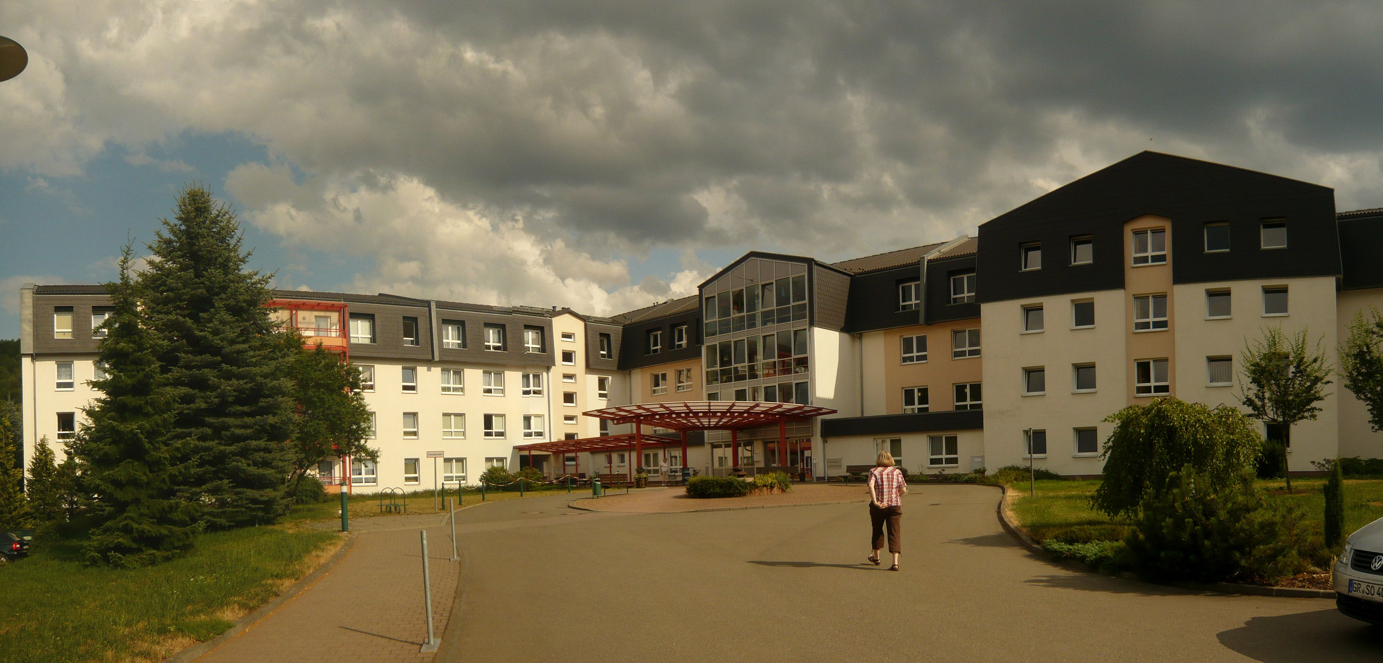 Aue (Sachsen), Seniorenheim Zeller Berg